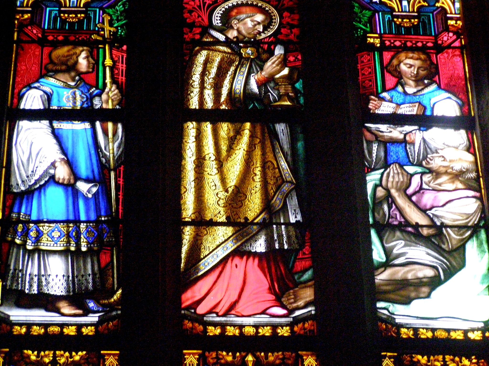 Stredná figurálna časť okna venovaného dómskemu farárovi Karolovi Heillerovi. Je na nej zobrazený Heillerov osobný patrón sv. Karol Boromejský pri udeľovaní eucharistie počas morovej epidémie v Miláne v roku 1576